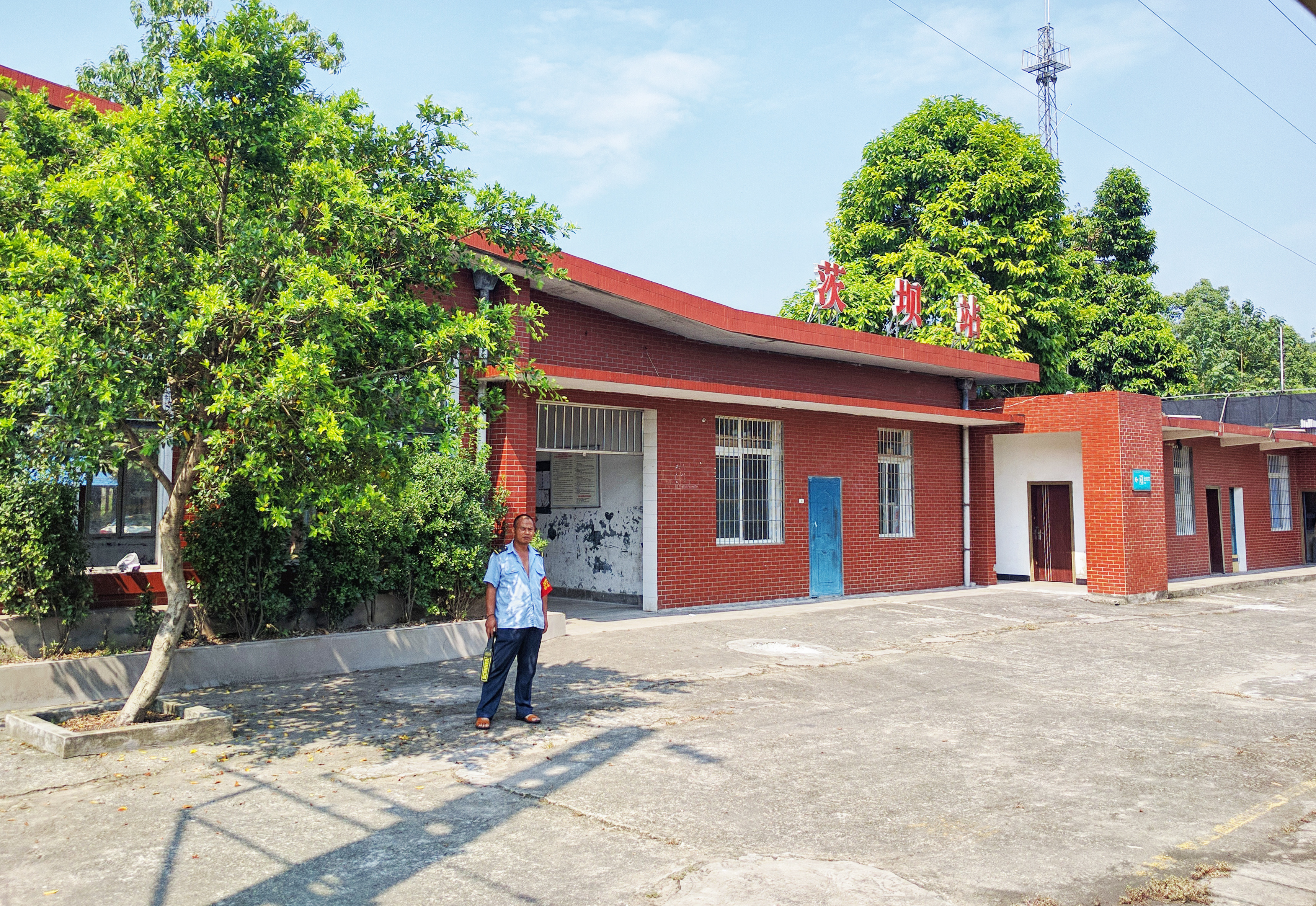 中文（中国大陆）: 成渝铁路茨坝站